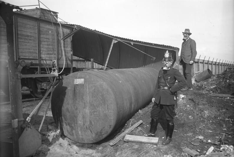 Die furchtbare Giftgaskatastrophe in Hamburg, welche bisher 11 Todesopfer und 250 Gasvergiftete erforderte. Schupo und Hilfsmannschaft an der Unglücksstelle mit Gasmasken. Vorn der explodierte Giftgastank.